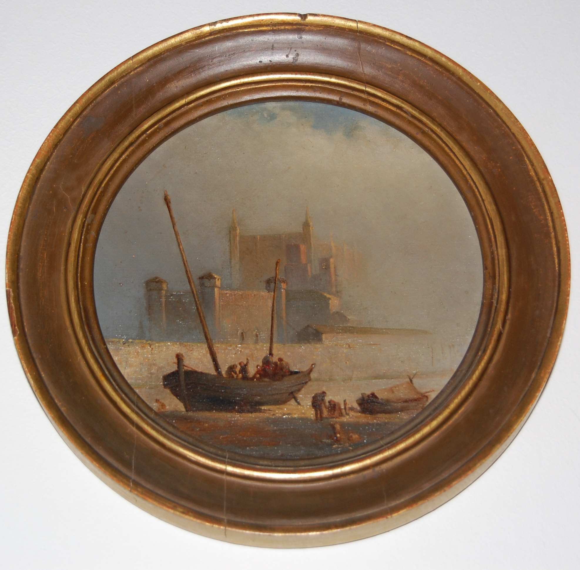 Vistes de la Catedral de Mallorca des de la platja.